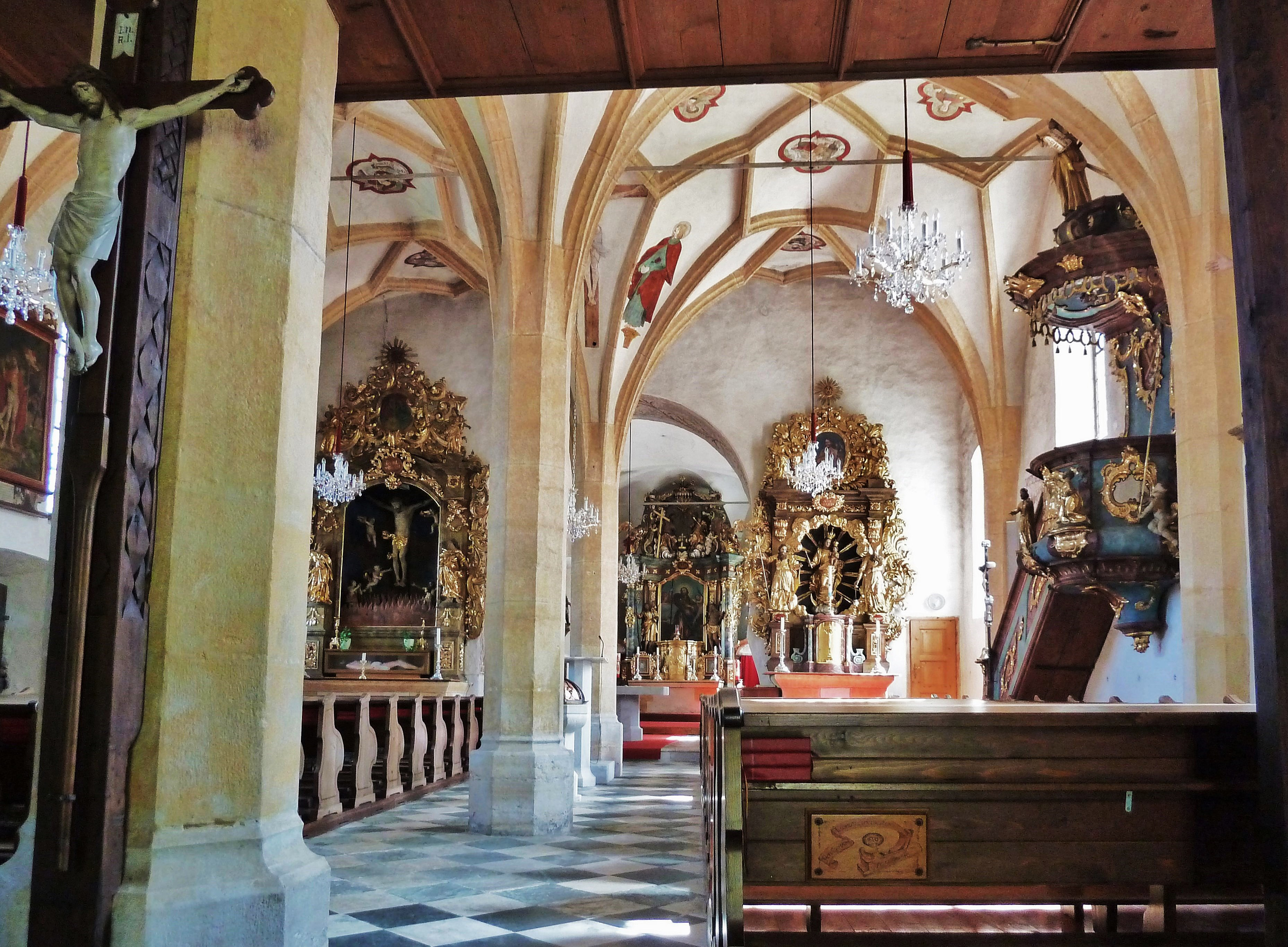 Kath. Pfarrkirche hl. Jakobus d. Ä., Tiffen. Innenansicht